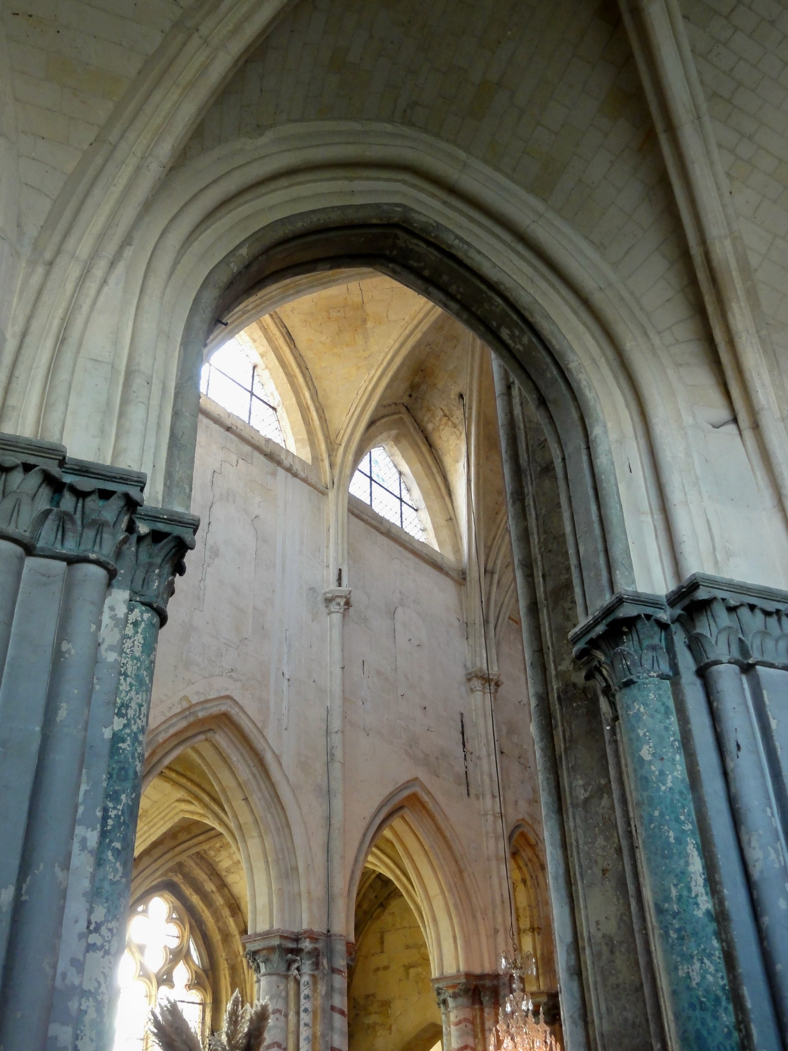 Grande arcade au nord de l'abside (déambulataoire), vue vers le sud.